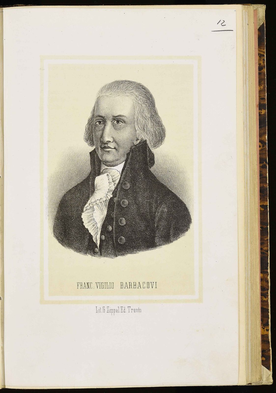 Litografia; 206x134 mm, in Francesco Ambrosi, Scrittori ed artisti trentini, Trento, Giovanni Zippel, 1883. Da Biblioteca Digitale Trentina.